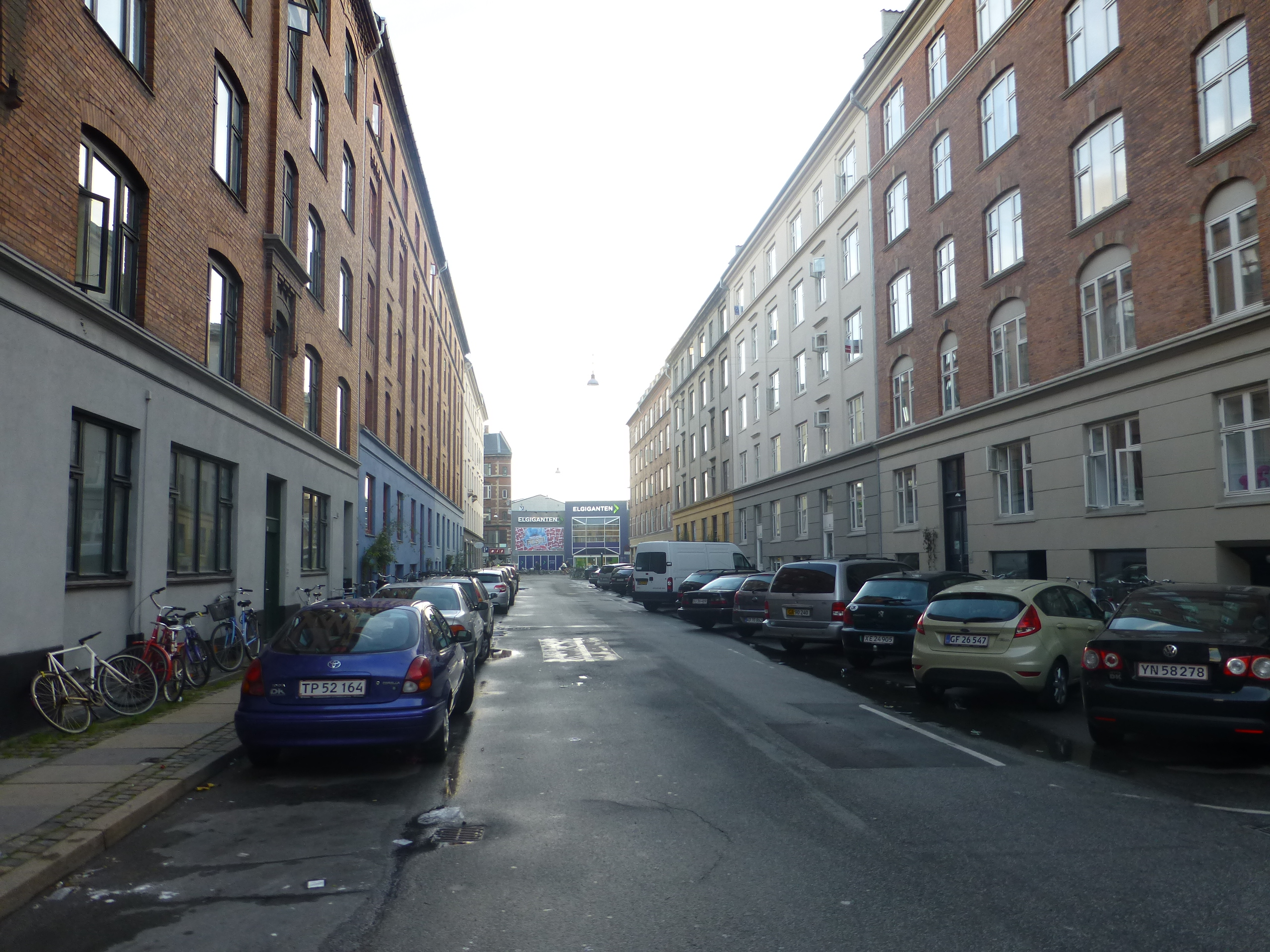 The street Ole Jørgensens Gade in Nørrebro in Copenhagen.